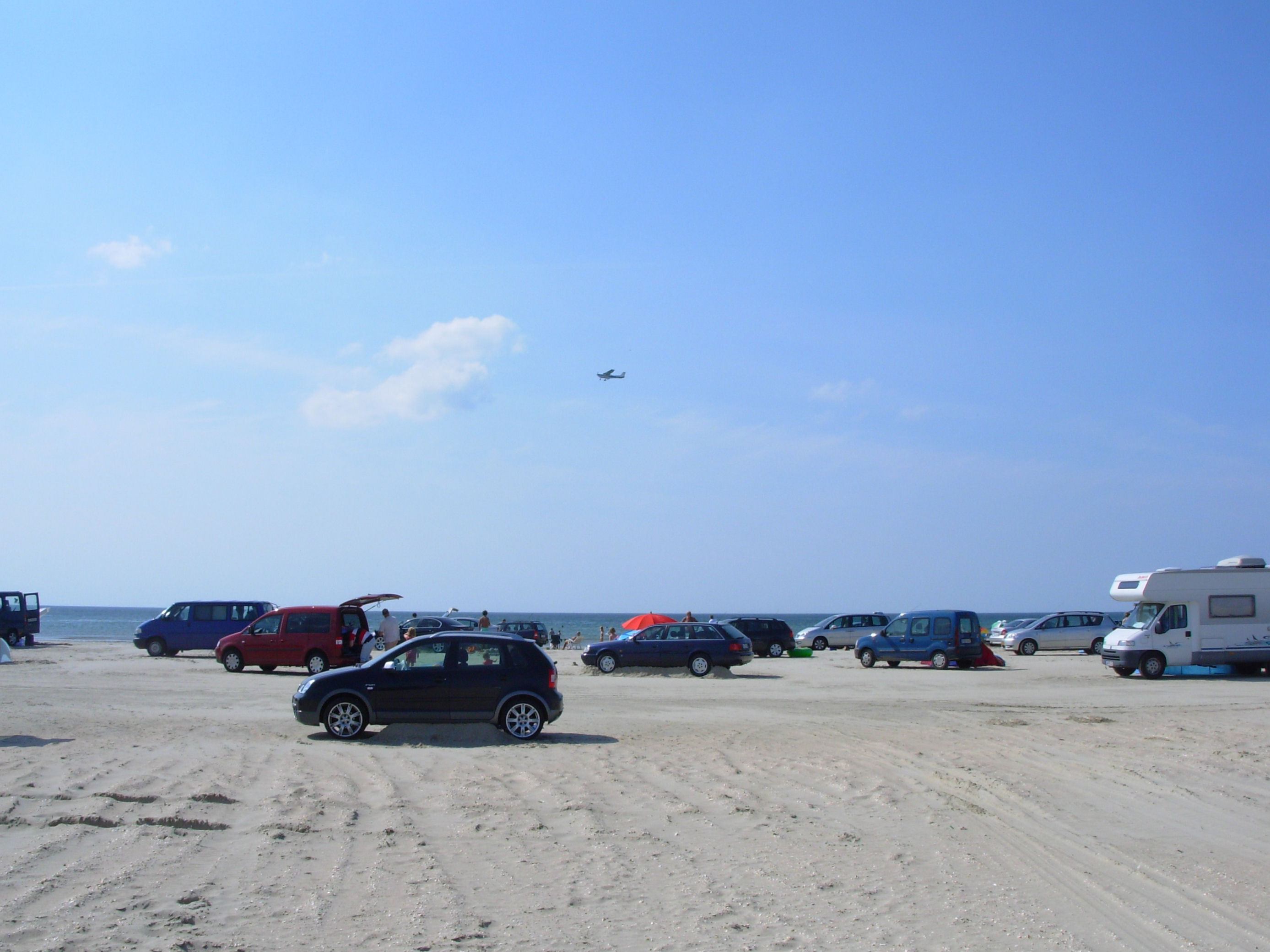 Badebetrieb auf Rømø